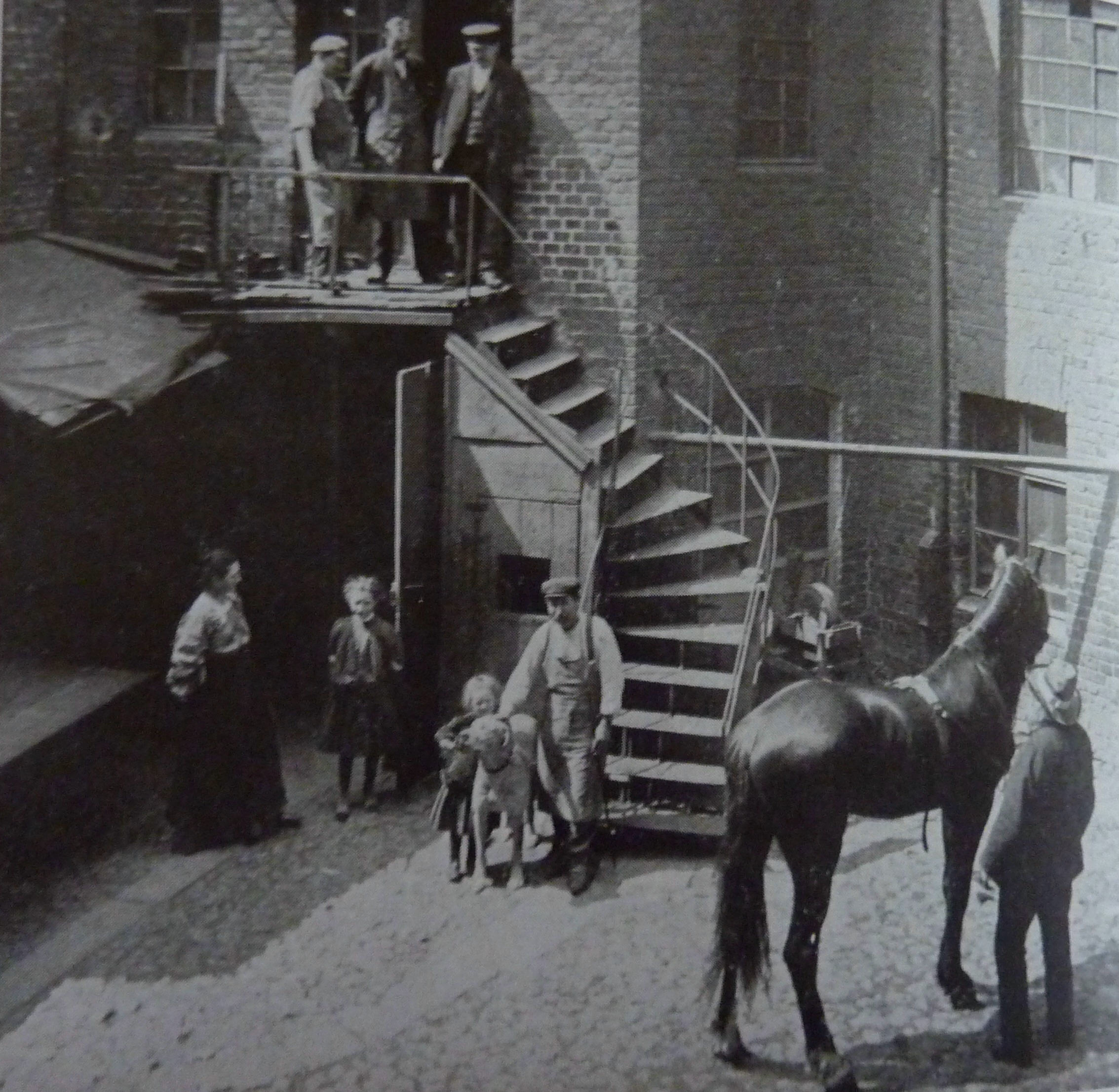 der kluge Hans auf dem Hof. Links Frau Piehl, in der Mitte Lottchen und Herr Piehl mit Hund Leo, rechts Wilhelm von Osten. Unbekannte auf der Treppe. Hans soll anzeigen, wieviele Personen auf der Treppe stehen und wieviele davon eine Kopfbedeckung tragen etc.